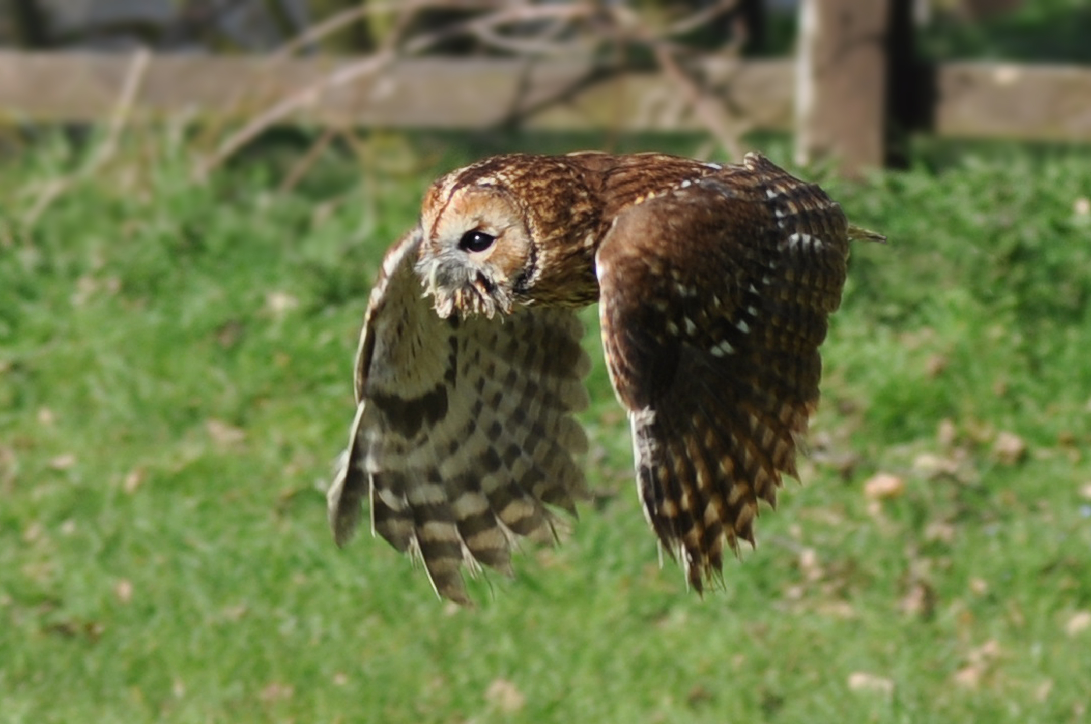 Tawny Owl in flight